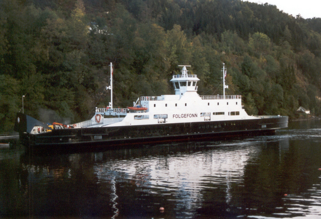 MF Folgefonn, built 1998 enroute between Hatvik and Vengjaneset (Hordaland, Norway) in 1998.